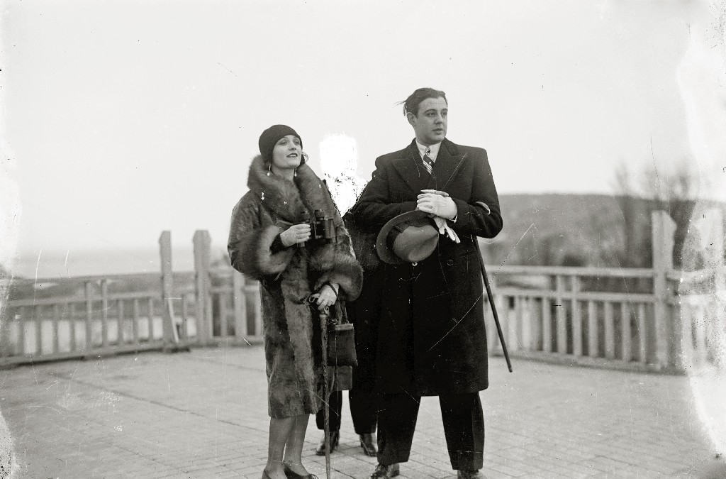 Título original: La actriz Pola Negri y el príncipe Mdivani en el parque de atracciónes de Igeldo (1/1) Localización: San Sebastián (Guipúzcoa)